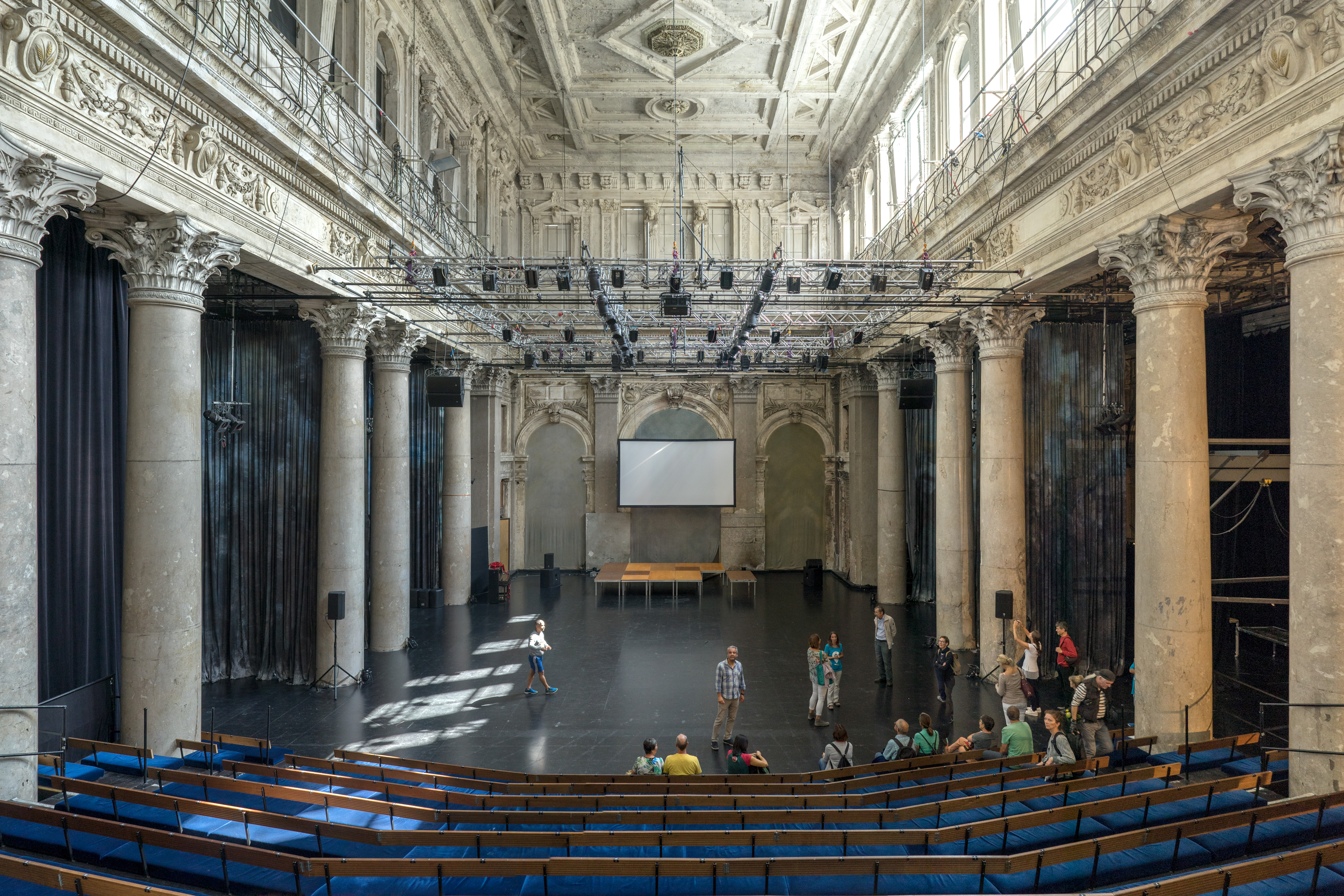 Odeon Theater. Großer Saal